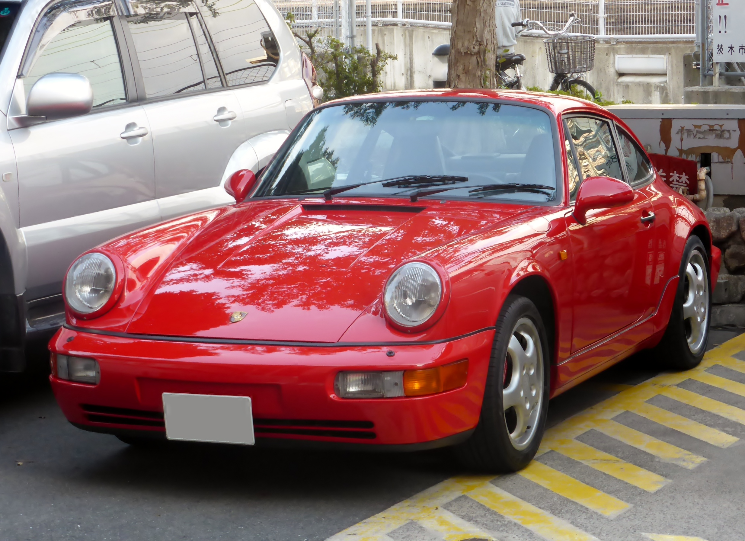 ポルシェ・964カレラ2クーペをフロントから撮影。